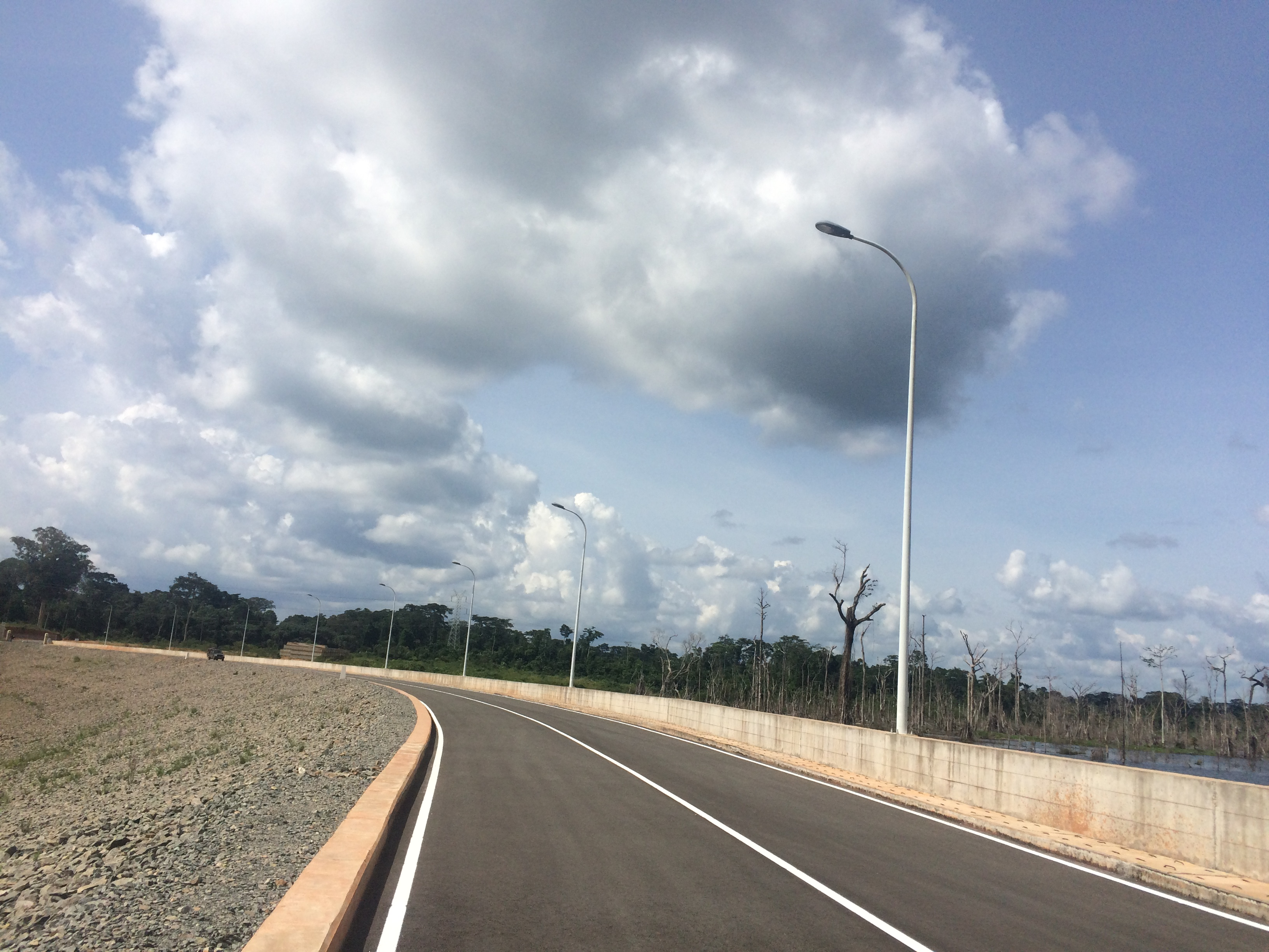 Cette image montre un paysage du barrage hydroélectrique de Memve'ele dans la région du Sud Cameroun